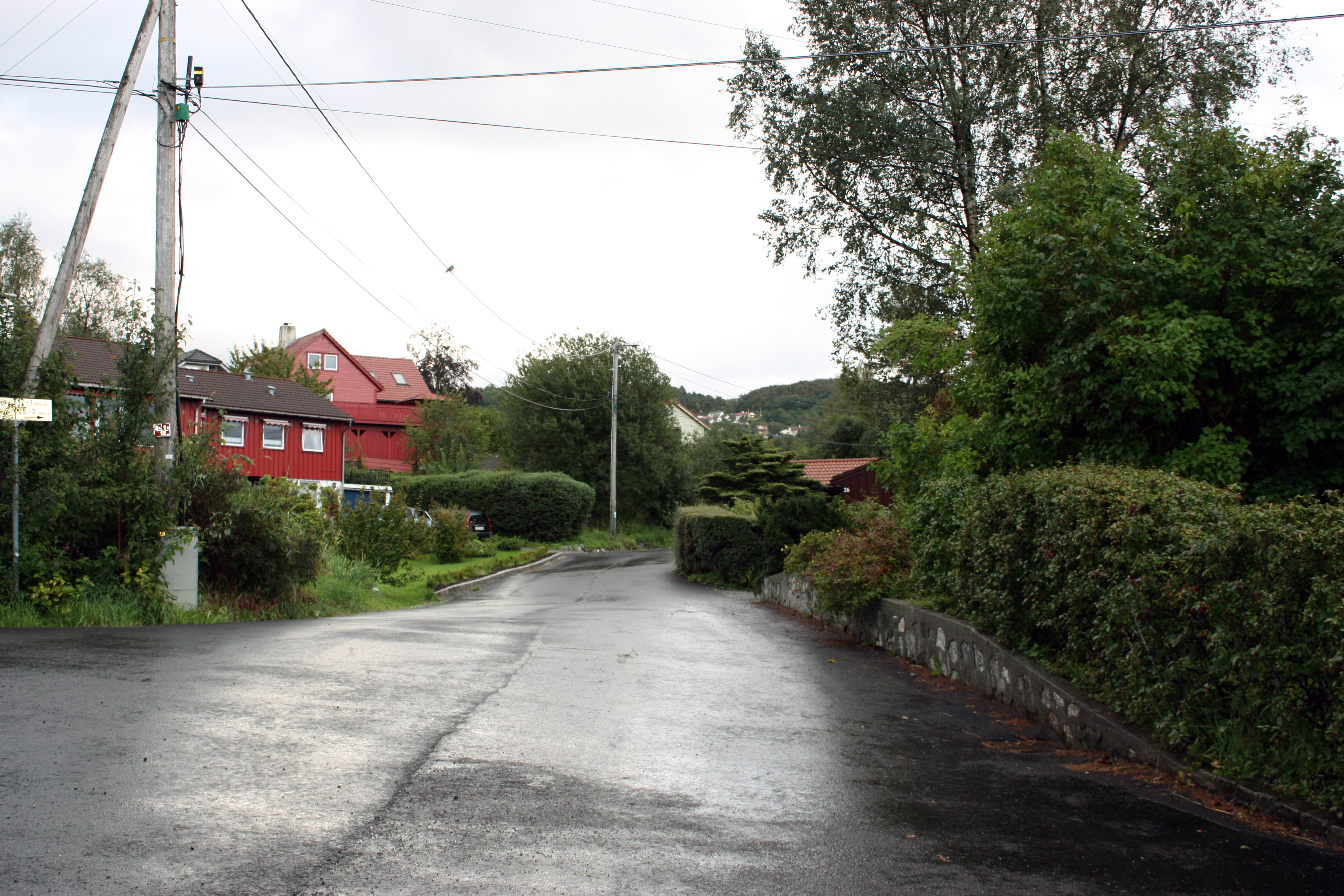 Ekornvegen, Fana, Bergen.